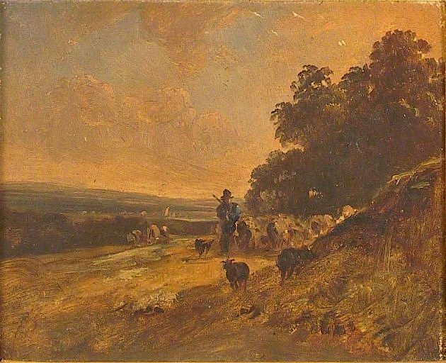 Geanimeerd landschap: vrouw en koe. Op papier geschilderd en op karton gemonteerd en meet 12,5 x 15,2 cm. Museum Loire-Atlantique